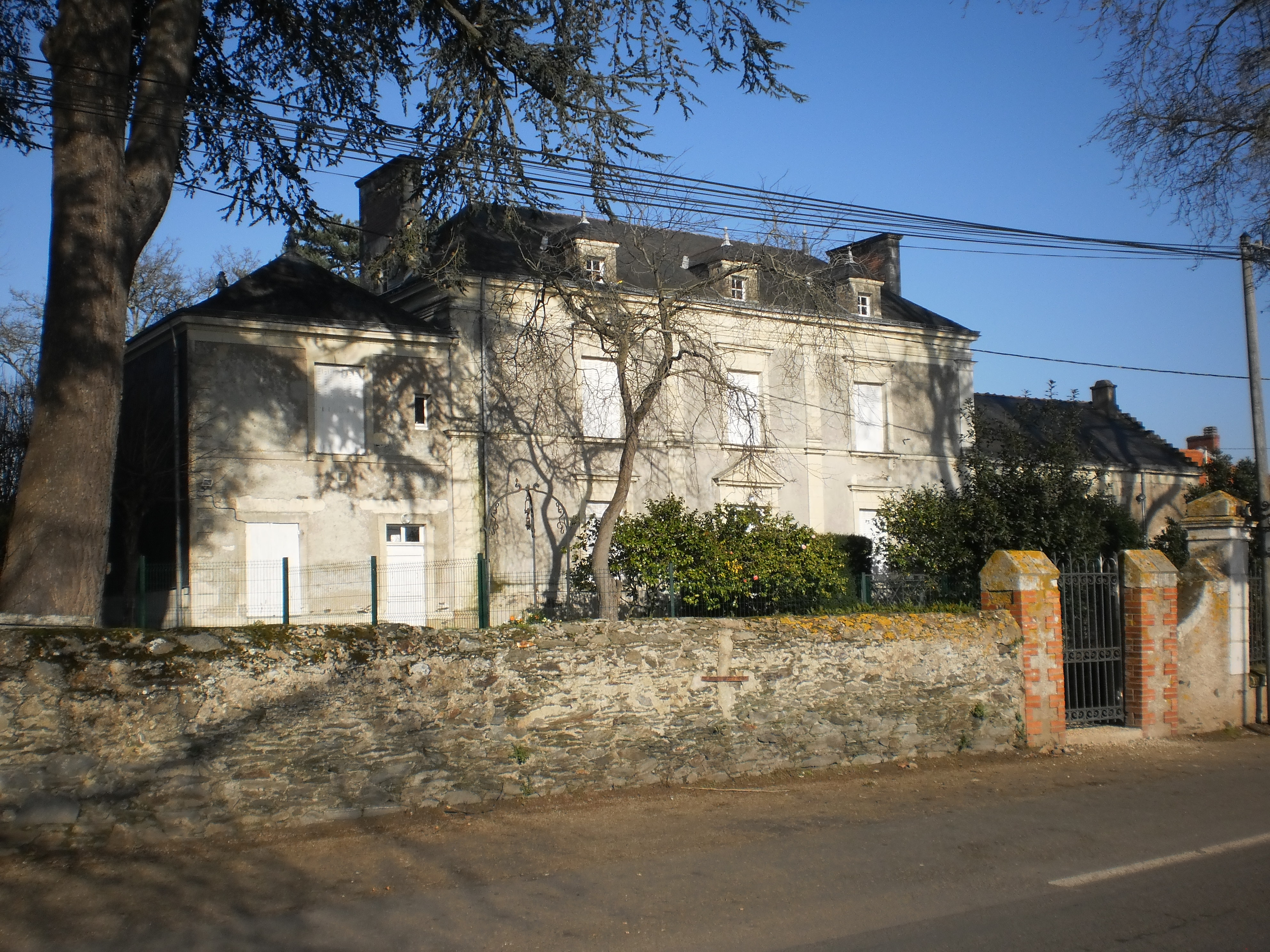 Manoir de Bellevue - Sainte-Luce-sur-Loire (Loire-Atlantique, France).